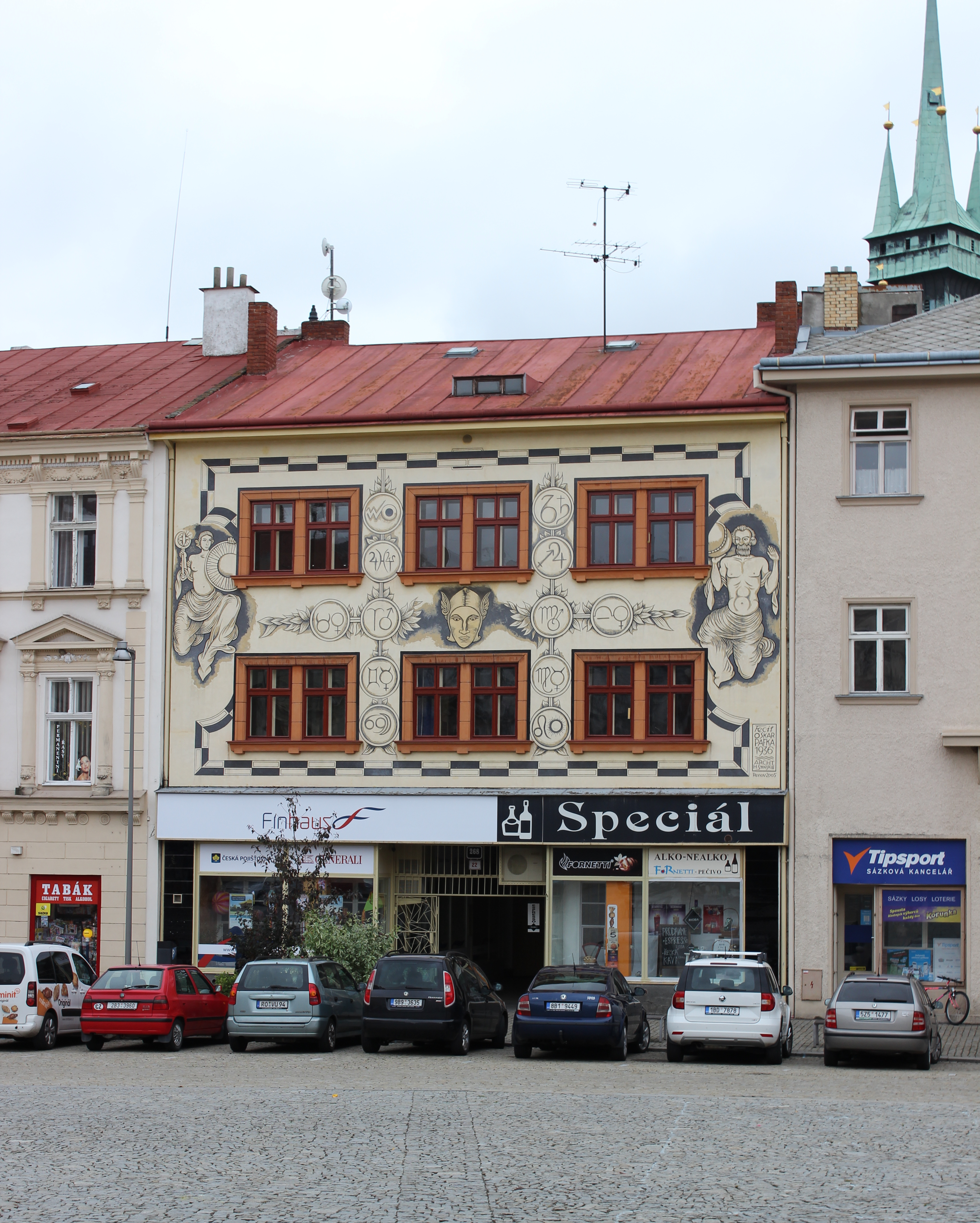 Dům číslo popisné 268 na znojemském Horním náměstí.